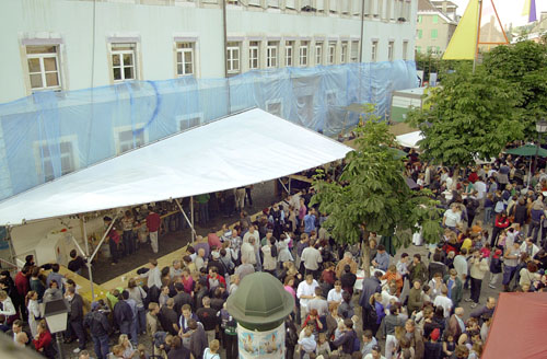 Spectacle de théatre de rue - Plage des six pompes